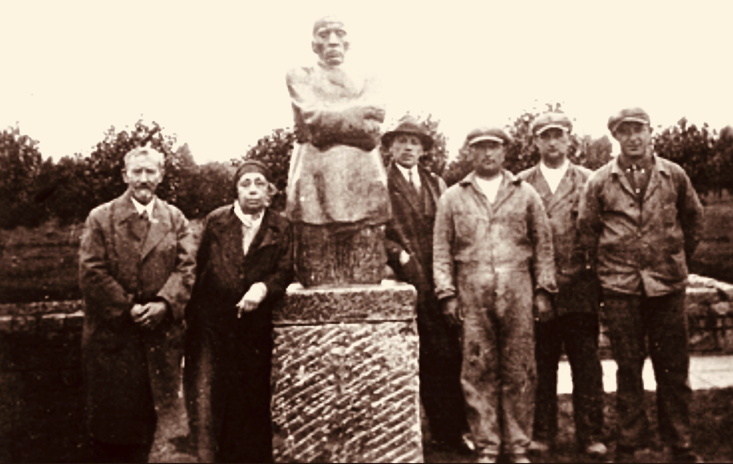 Links: Karl Kollwitz (1863–1940) und Käthe Kollwitz (1867–1945) neben der die Gesichtszüge von Karl Kollwitz tragenden Skulptur als Teil der zweiteiligen Figurengruppe Das trauernde Elternpaar von Käthe Kollwitz, am 23. Juli 1932 auf dem deutschen Kriegerfriedhof in Esen-Roggeveld, Westflandern, Belgien, errichtet.